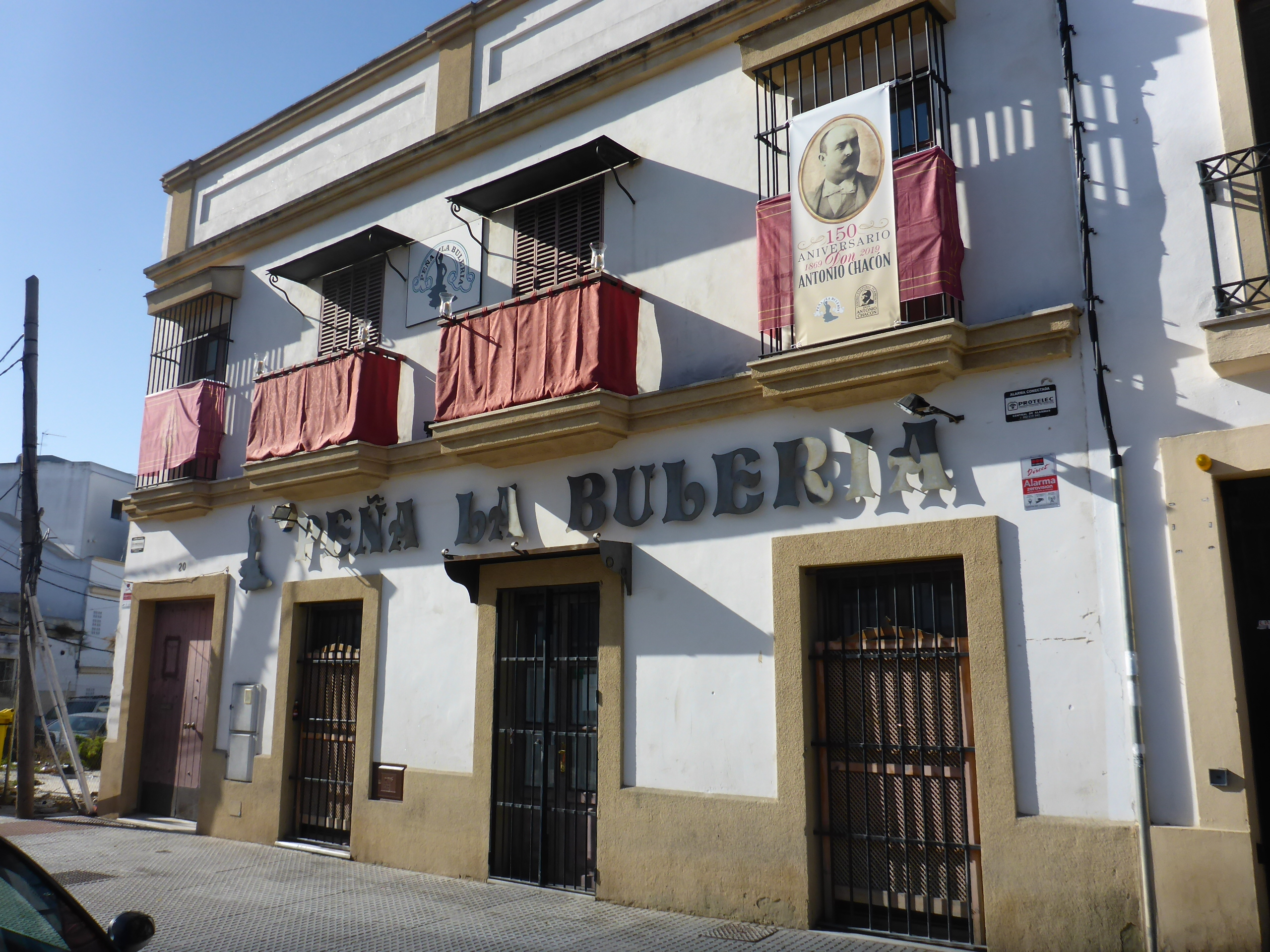 Peña "La Bulería" en Jerez de la Frontera con celebración del aniversario de Antonio Chacón